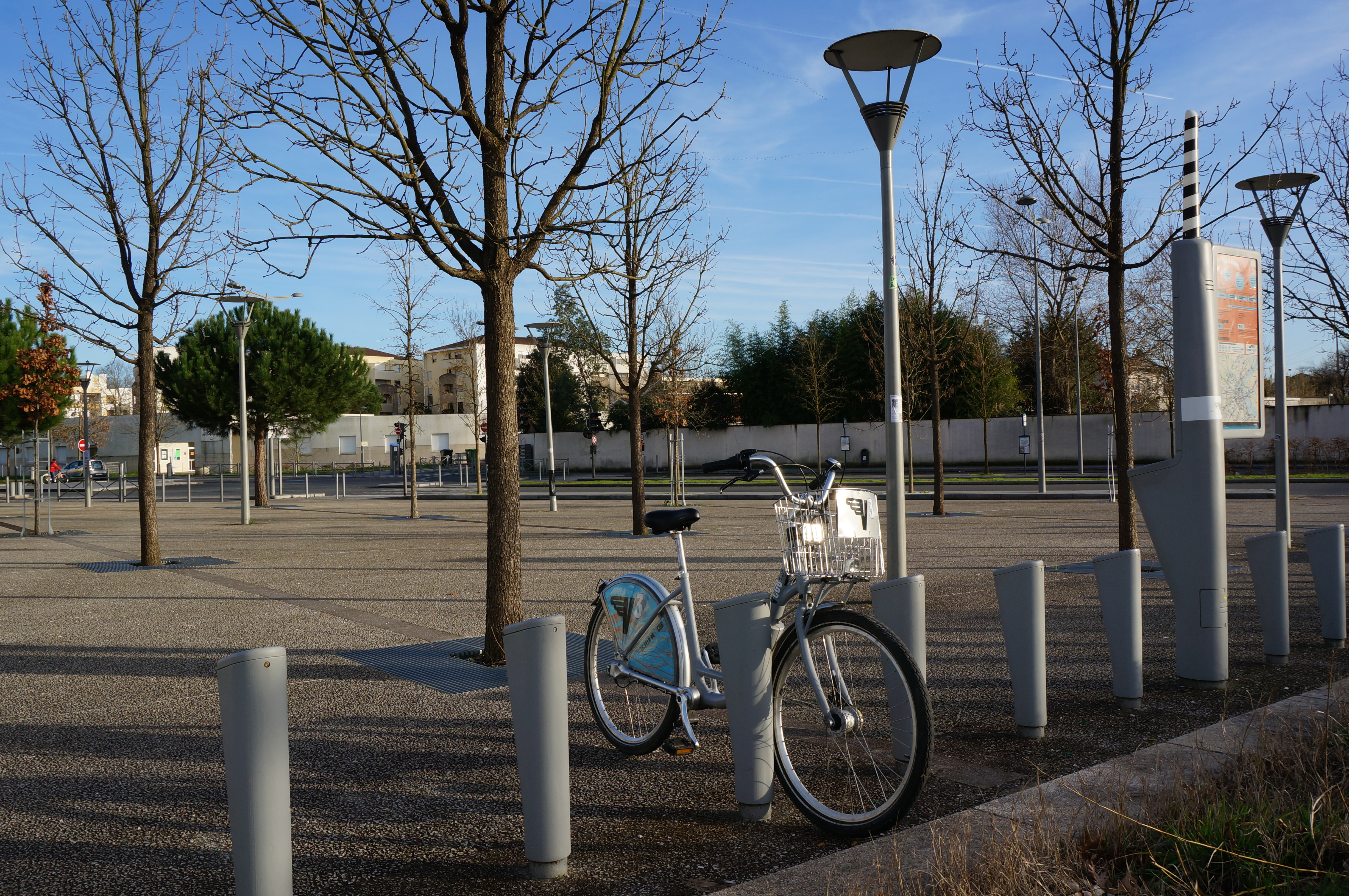 Station de vélos VCub Fontaine d'Arlac, à Mérignac en Gironde ; située à proximité de l'arrêt du tramway A, de la gare Mérignac-Arlac, de la station de véhicules électriques d'autopartage BlueCub.